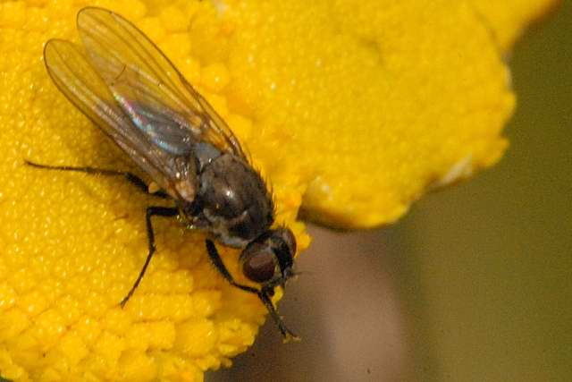 Fannia lepida from Commanster, Belgian High Ardennes .